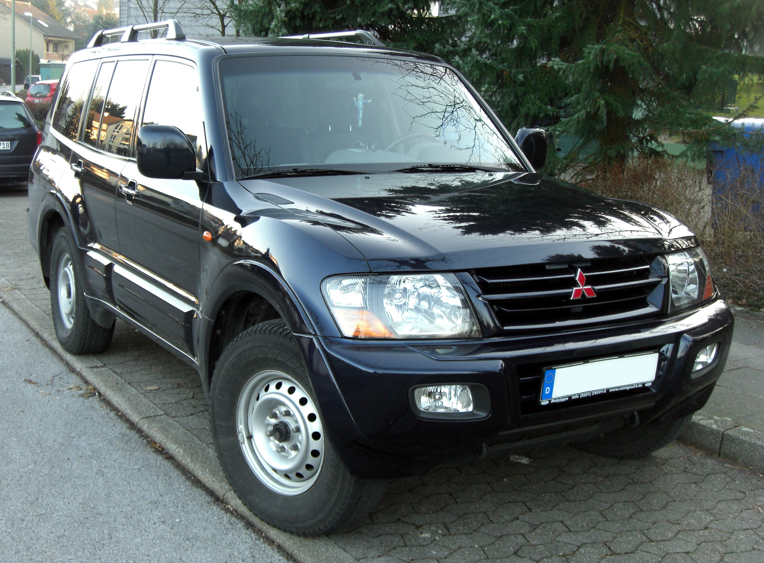 Mitsubishi Pajero